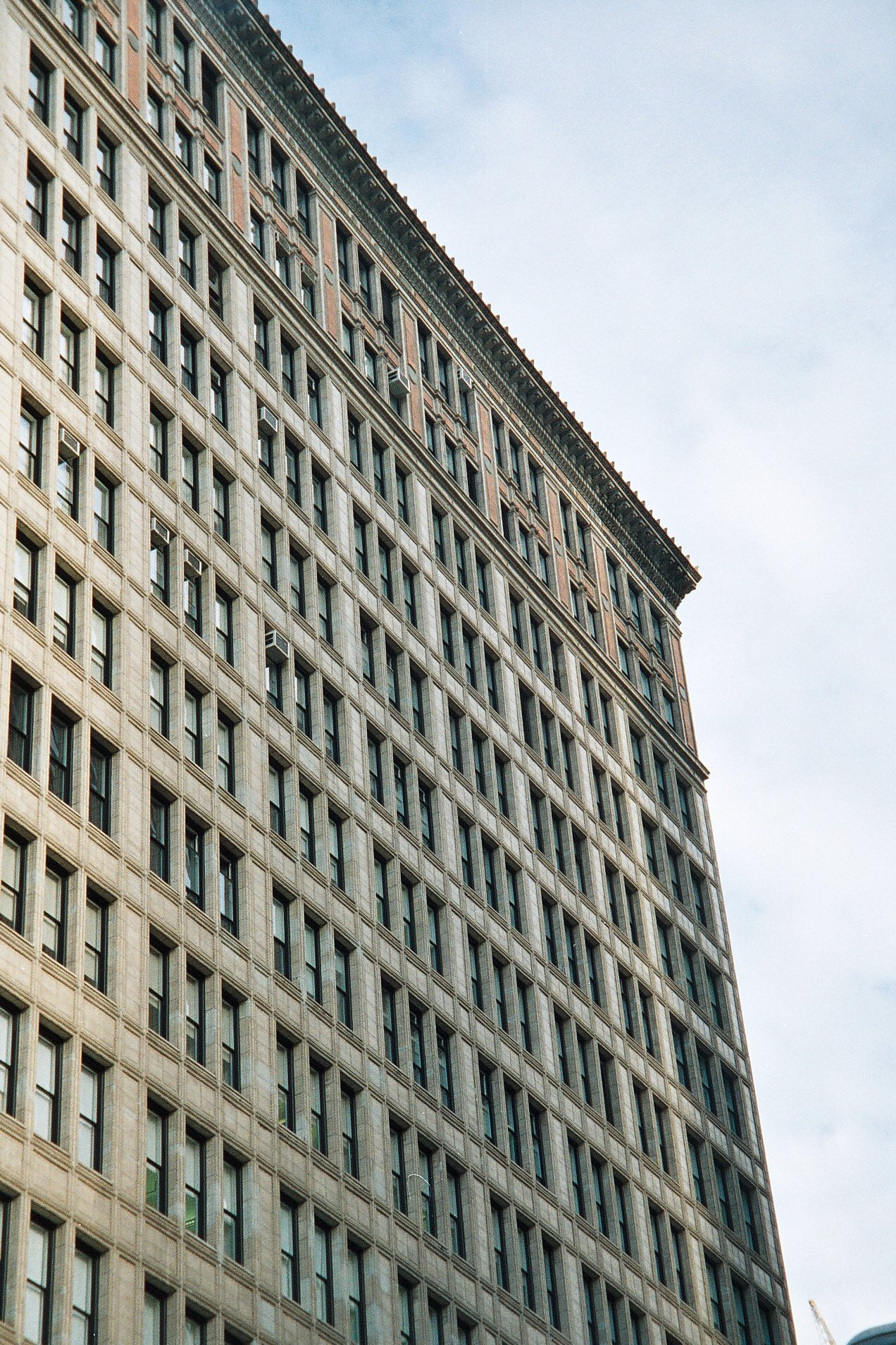 Everett Building (Detail)